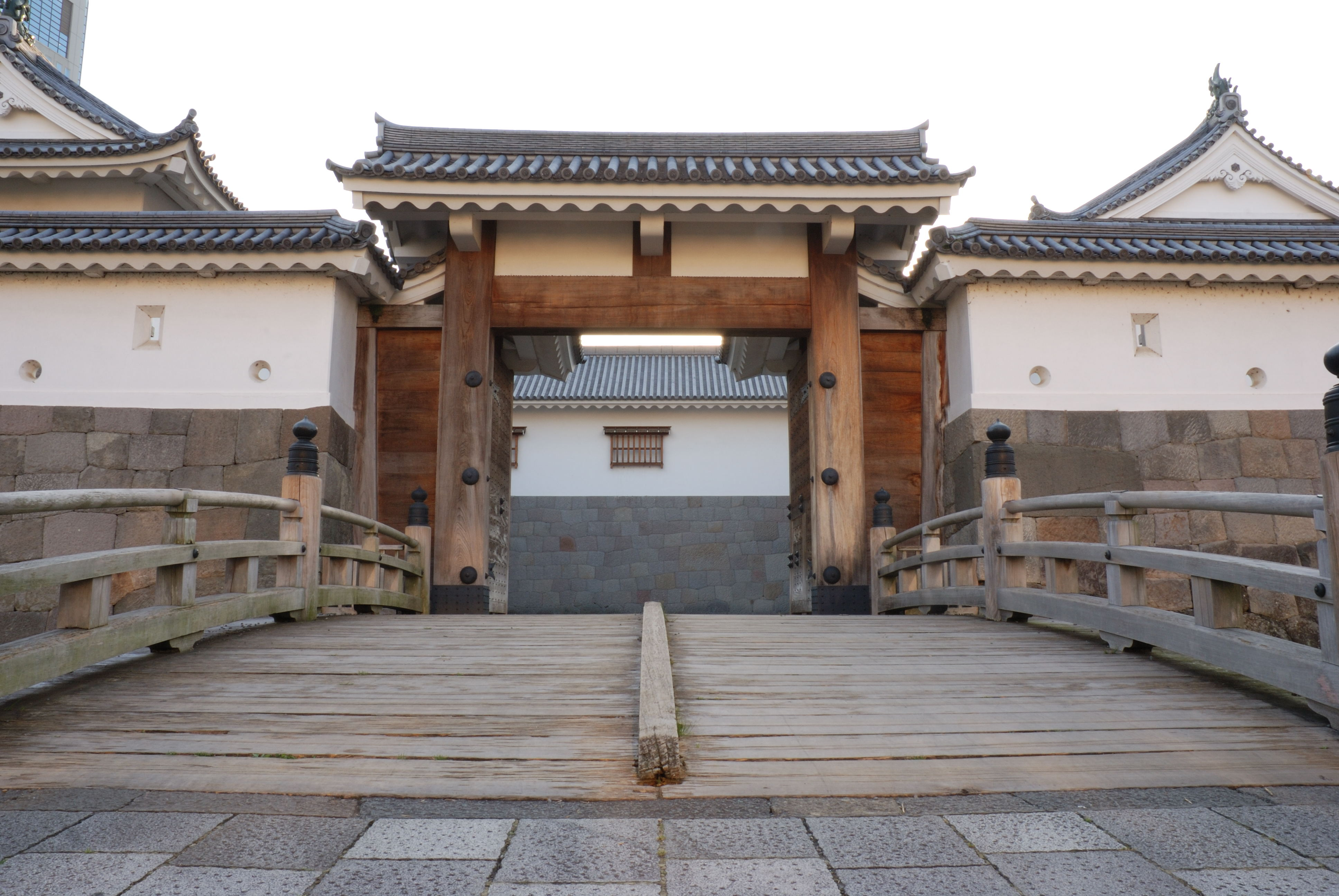 Higashigomon koraimon